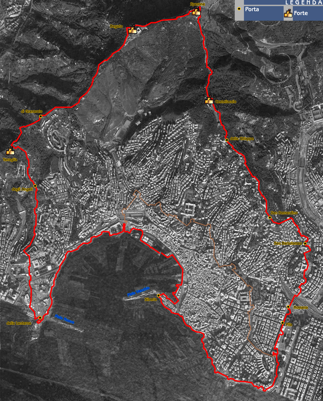 Murallas de Génova (Italia)